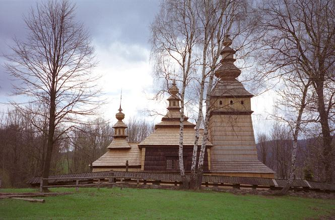 Cerkiew w Kotani